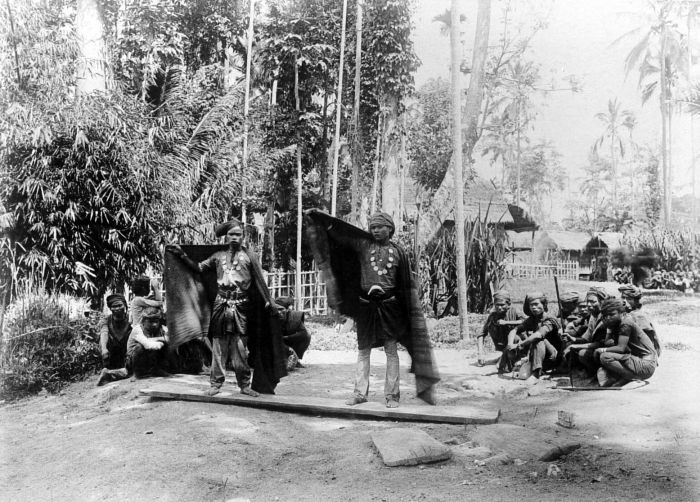 Repronegatief. Mannen dansen Didong, een Gajo-dans